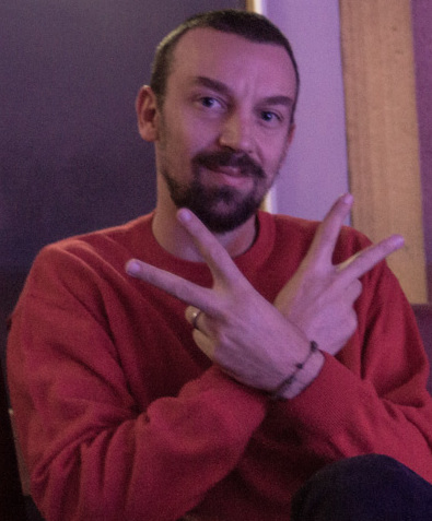 Festival EntreVues 2013 - Alberto Fasulo, mention spéciale du jury pour TIR.